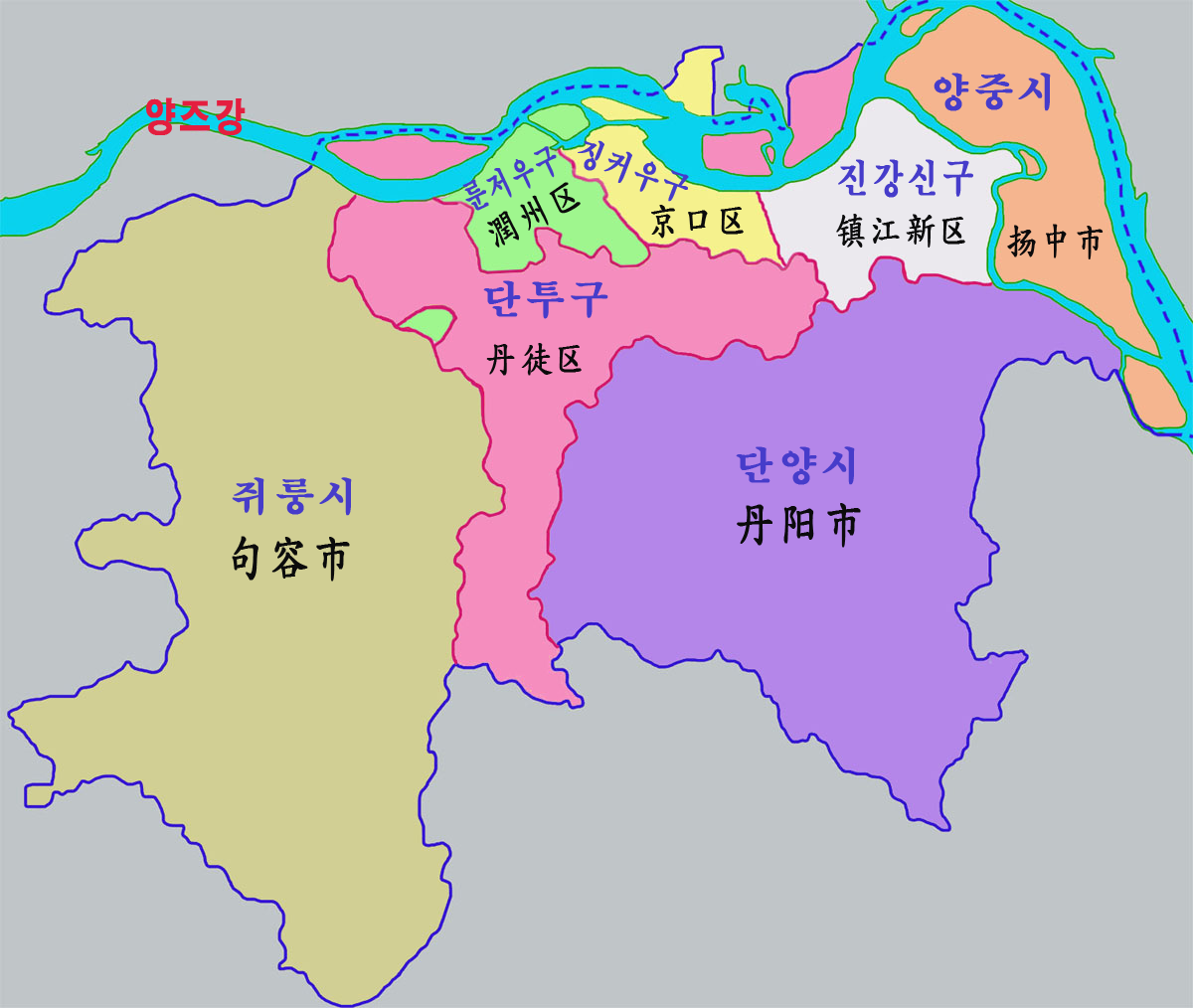 전장시 현급행정구역도